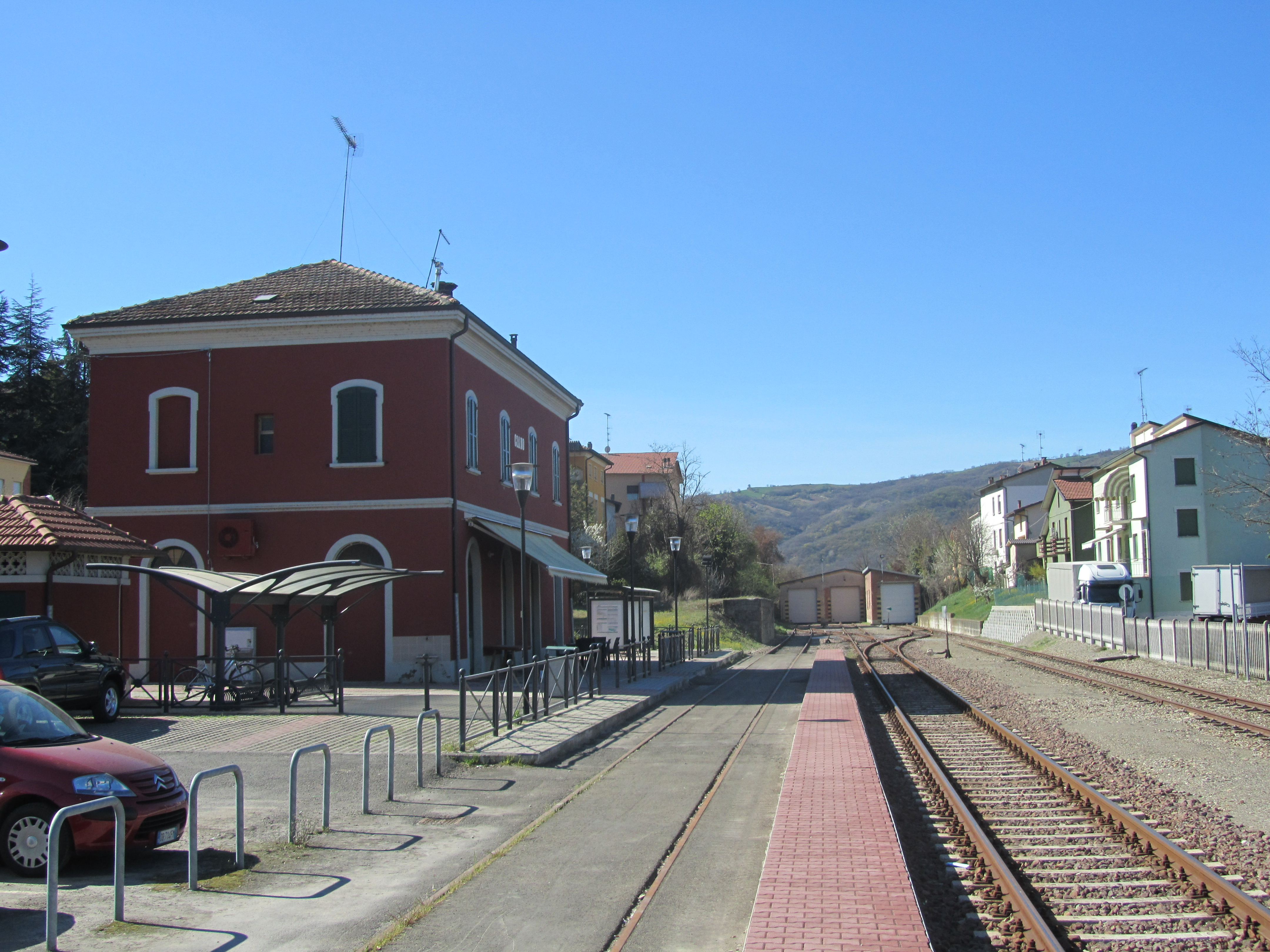 La stazione di Ciano, provincia di Reggio nell'Emilia.